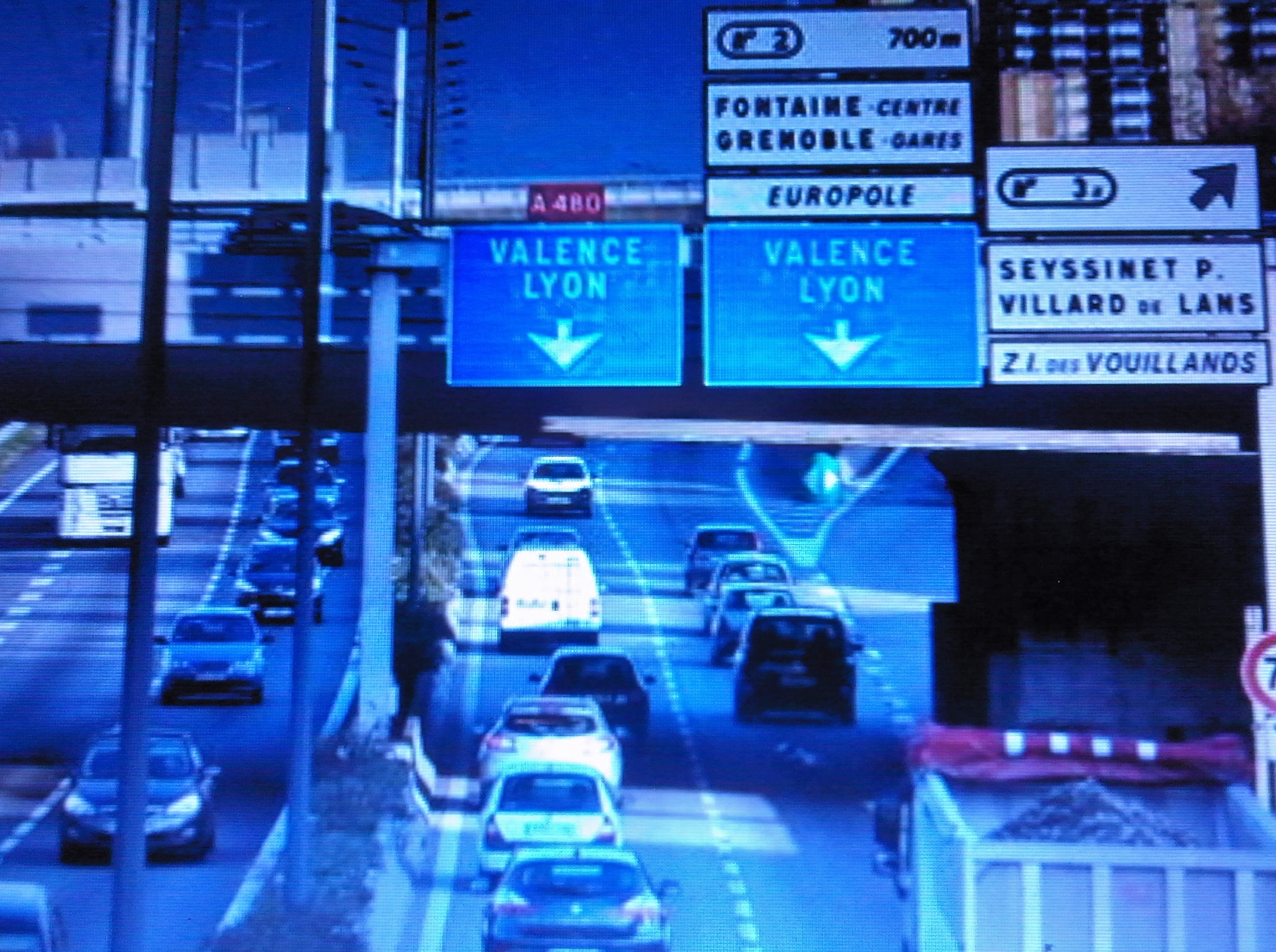 A480 ( France )